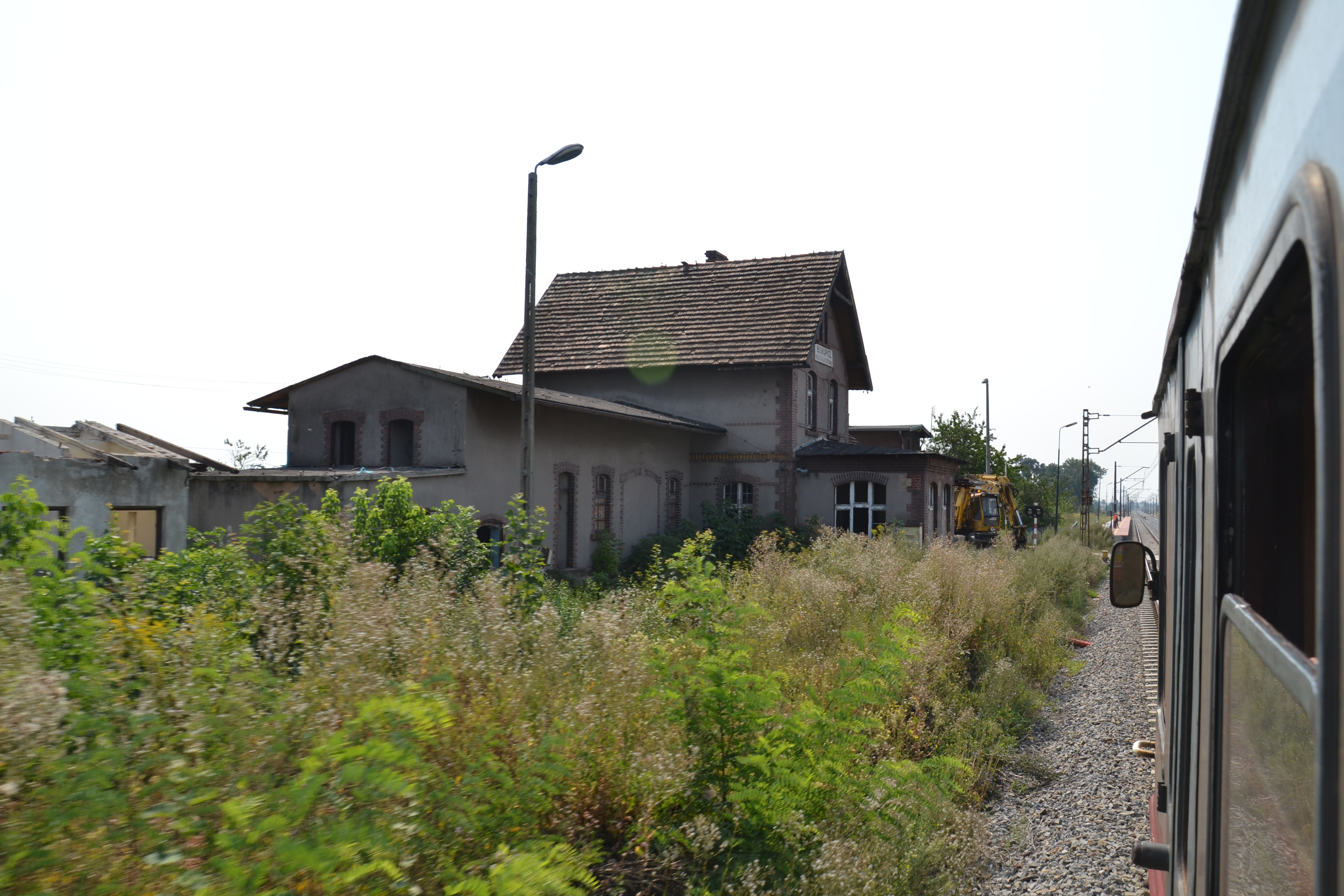 Przystanek osobowy Biskupice koło Kluczborka This photo was taken during Railway Wikiexpedition 2015 set up by Wikimedia Polska Association in cooperation with Fundacja Grupy PKP. You can see all photographs in category Wikiekspedycja kolejowa 2015.